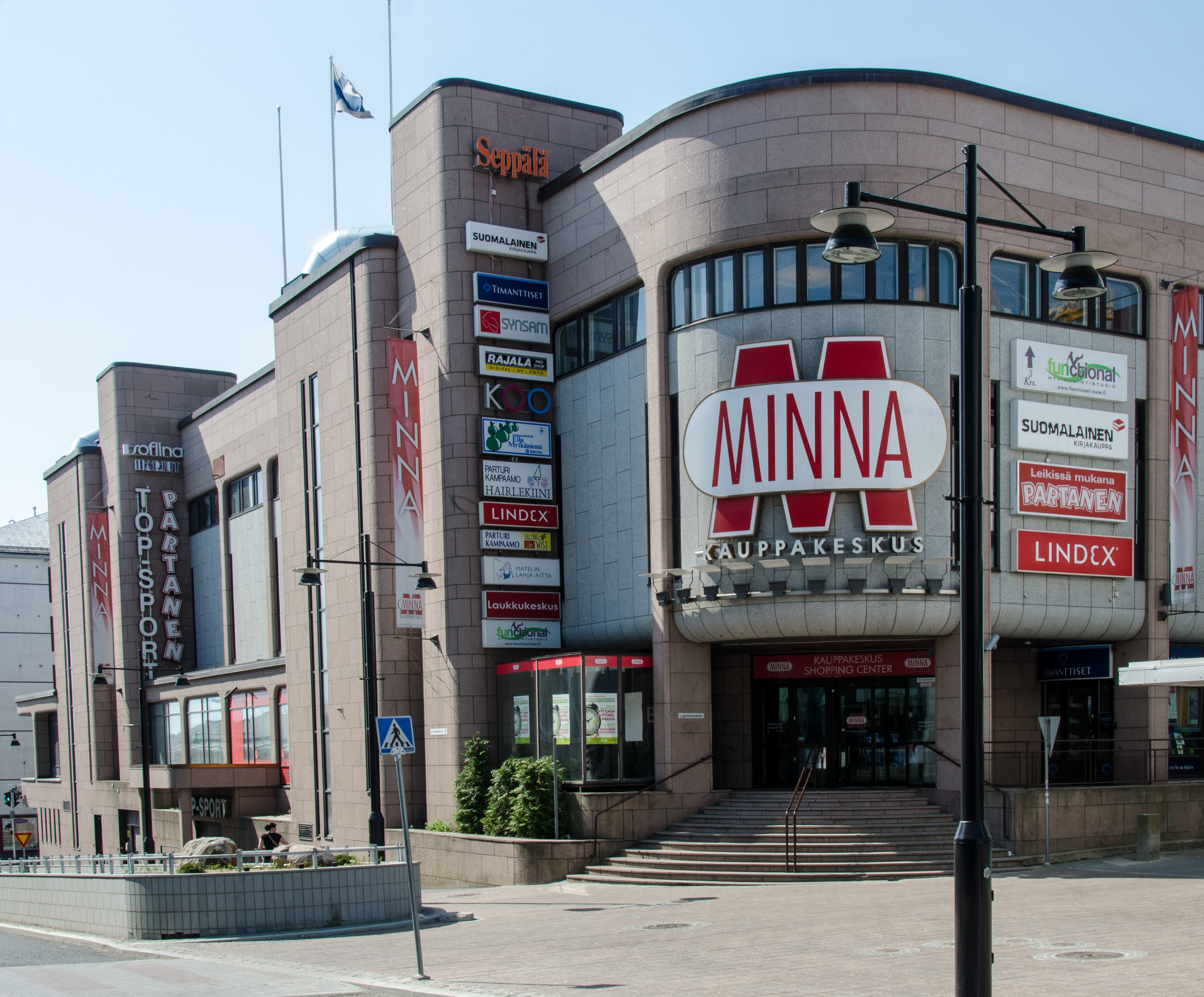 Kauppakeskus Minna keväällä 2014